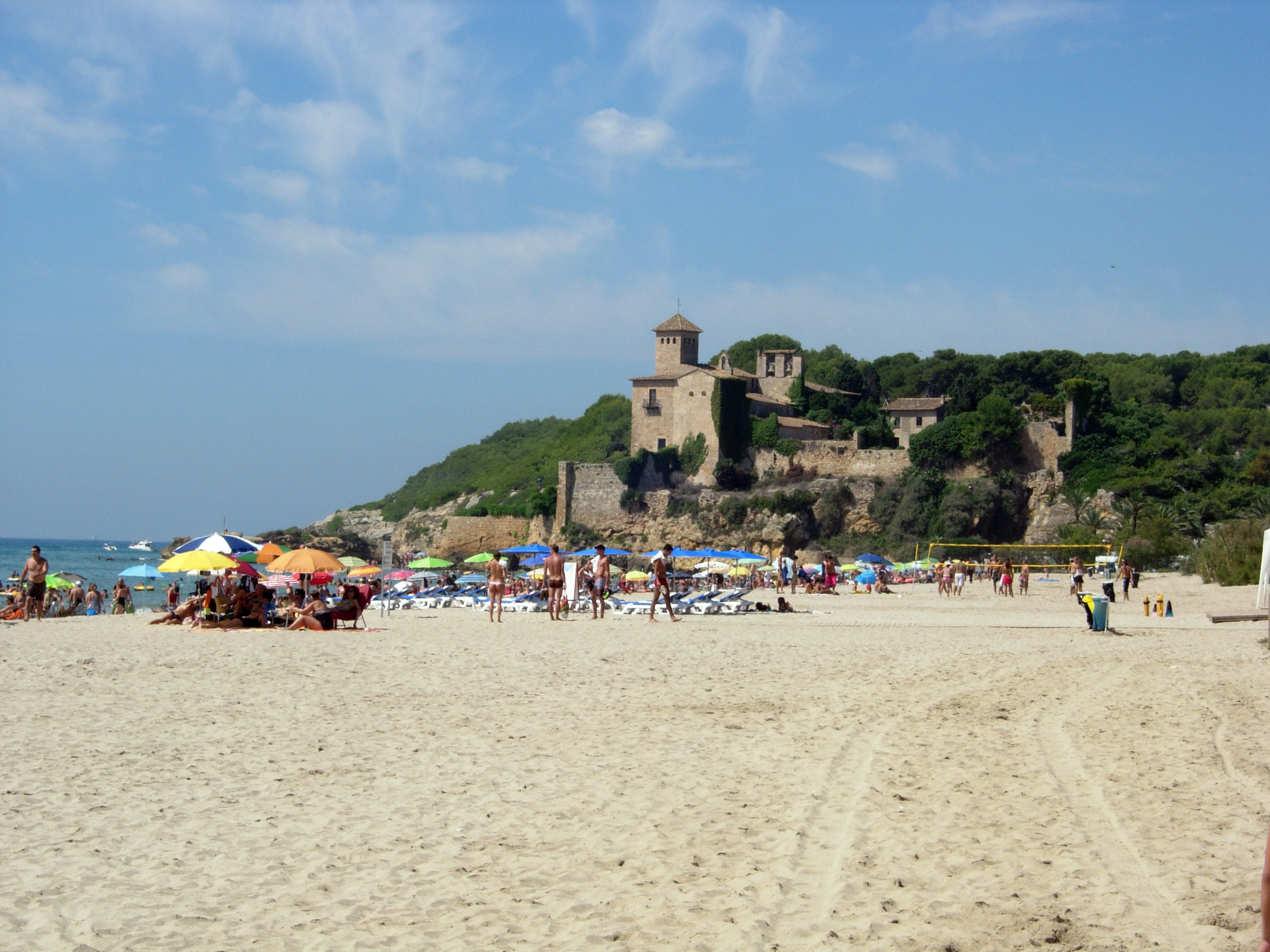 Platja de Tamarit